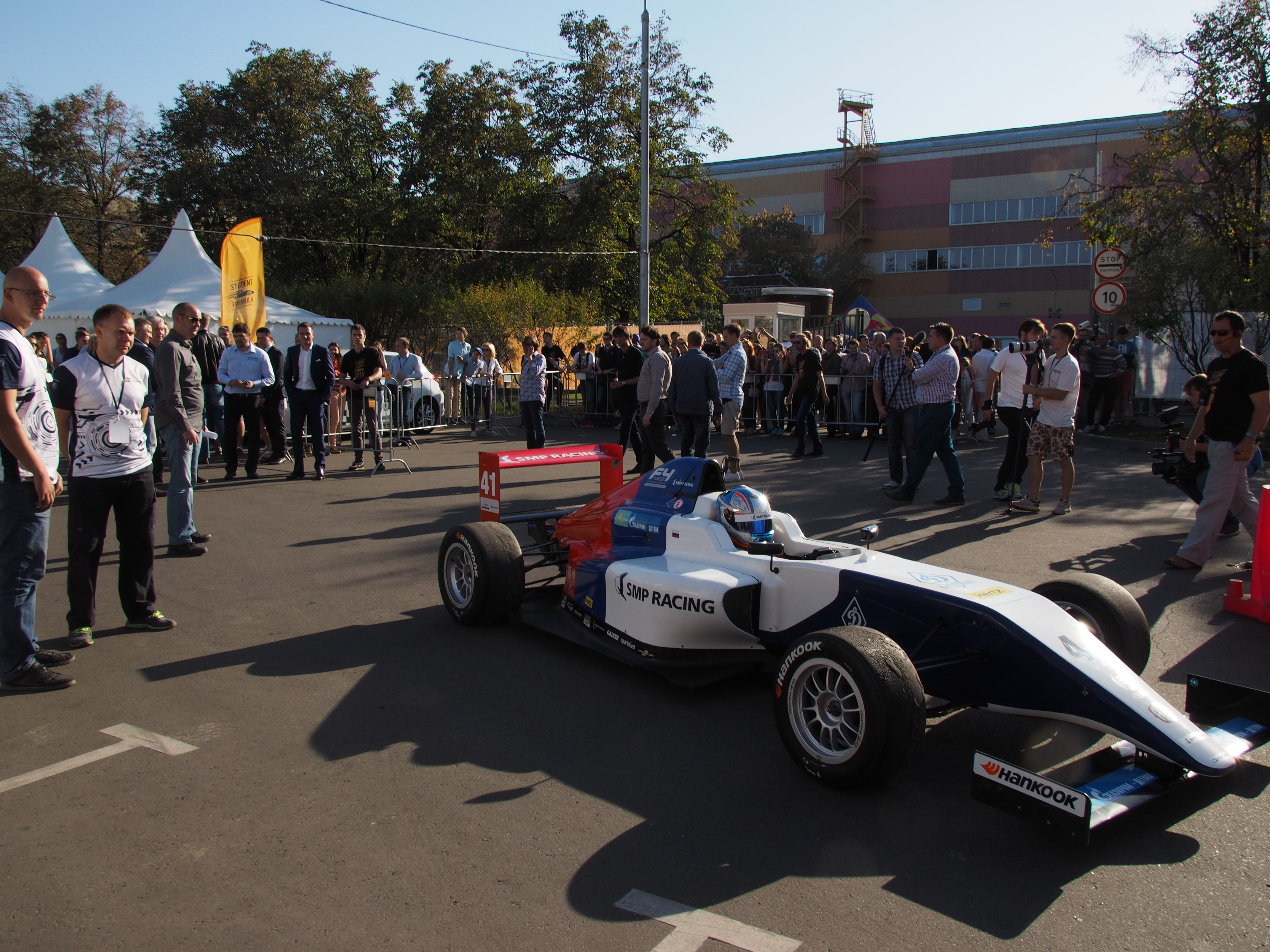 Москва, 2015 год, Технополис «Москва